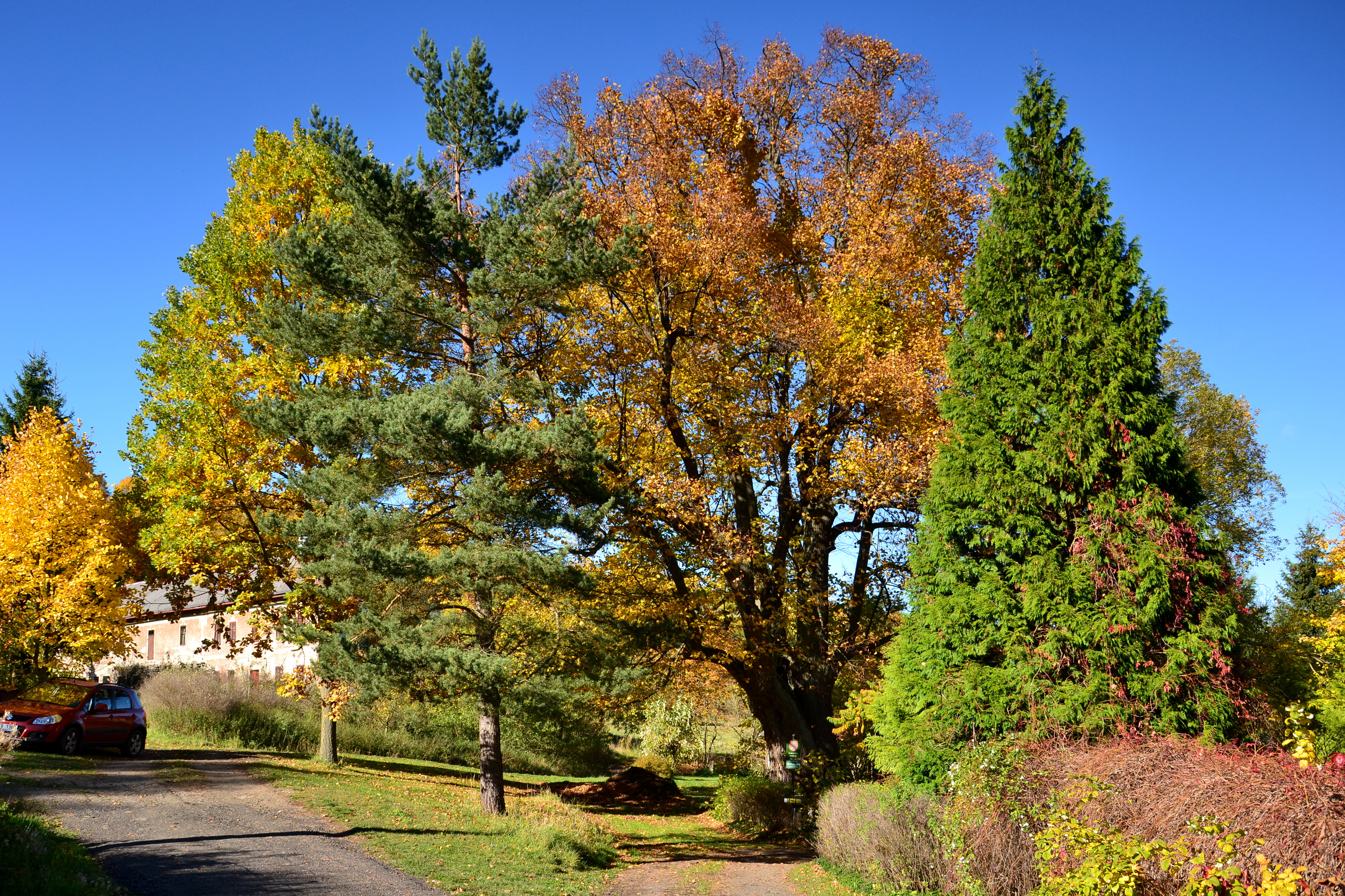 Jesínky – památná lípa velkolistá na návsi